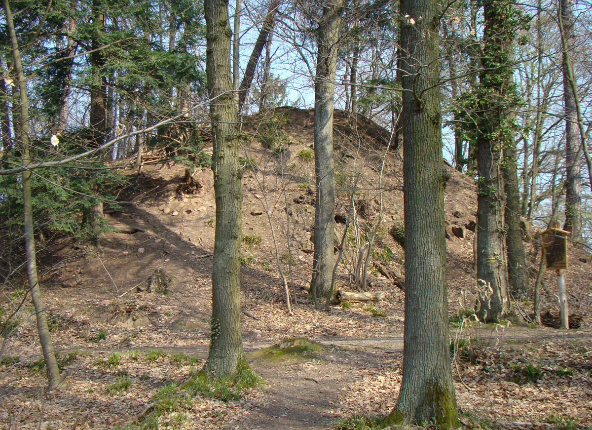 Mottenhügel der ehem. Oberen Burg in Heidelberg